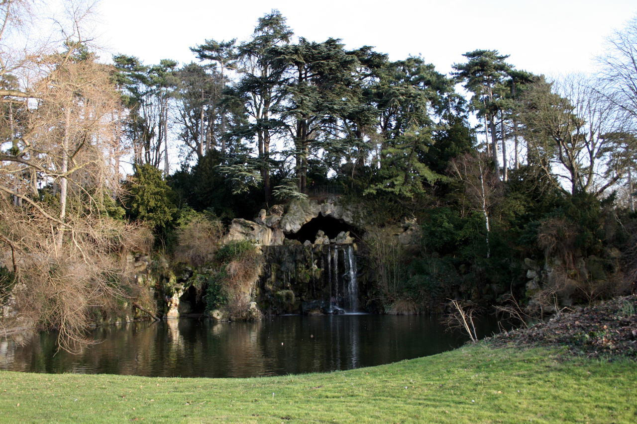 Grande cascade du bois de Boulogne